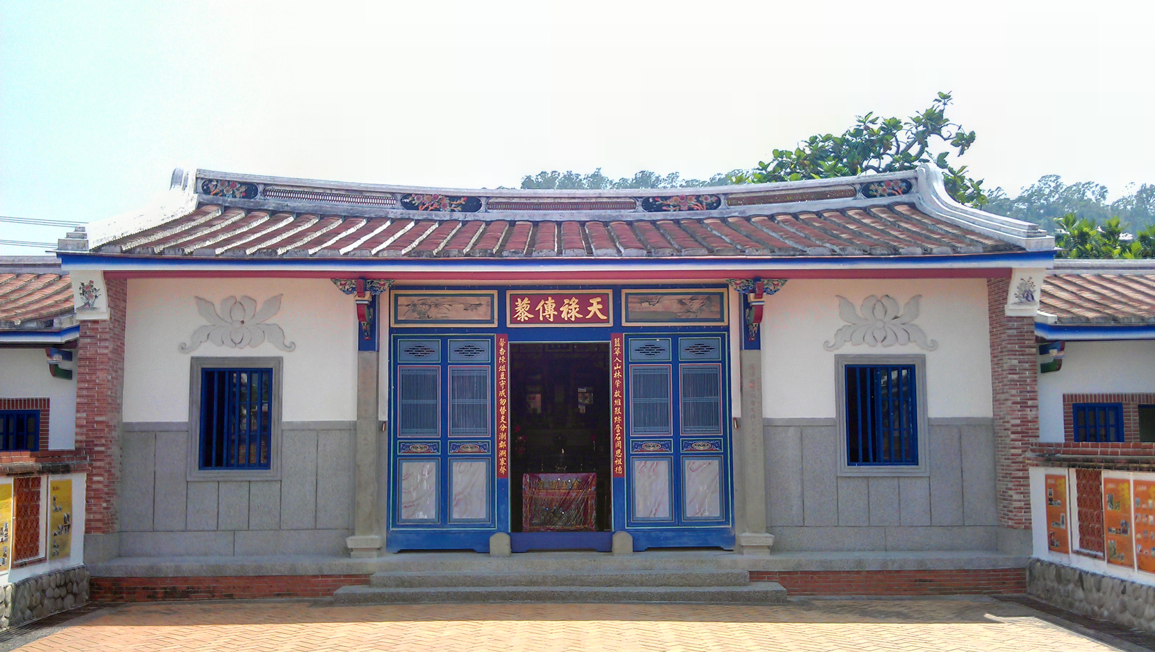 中文（台灣）: 土牛客家文化館正廳